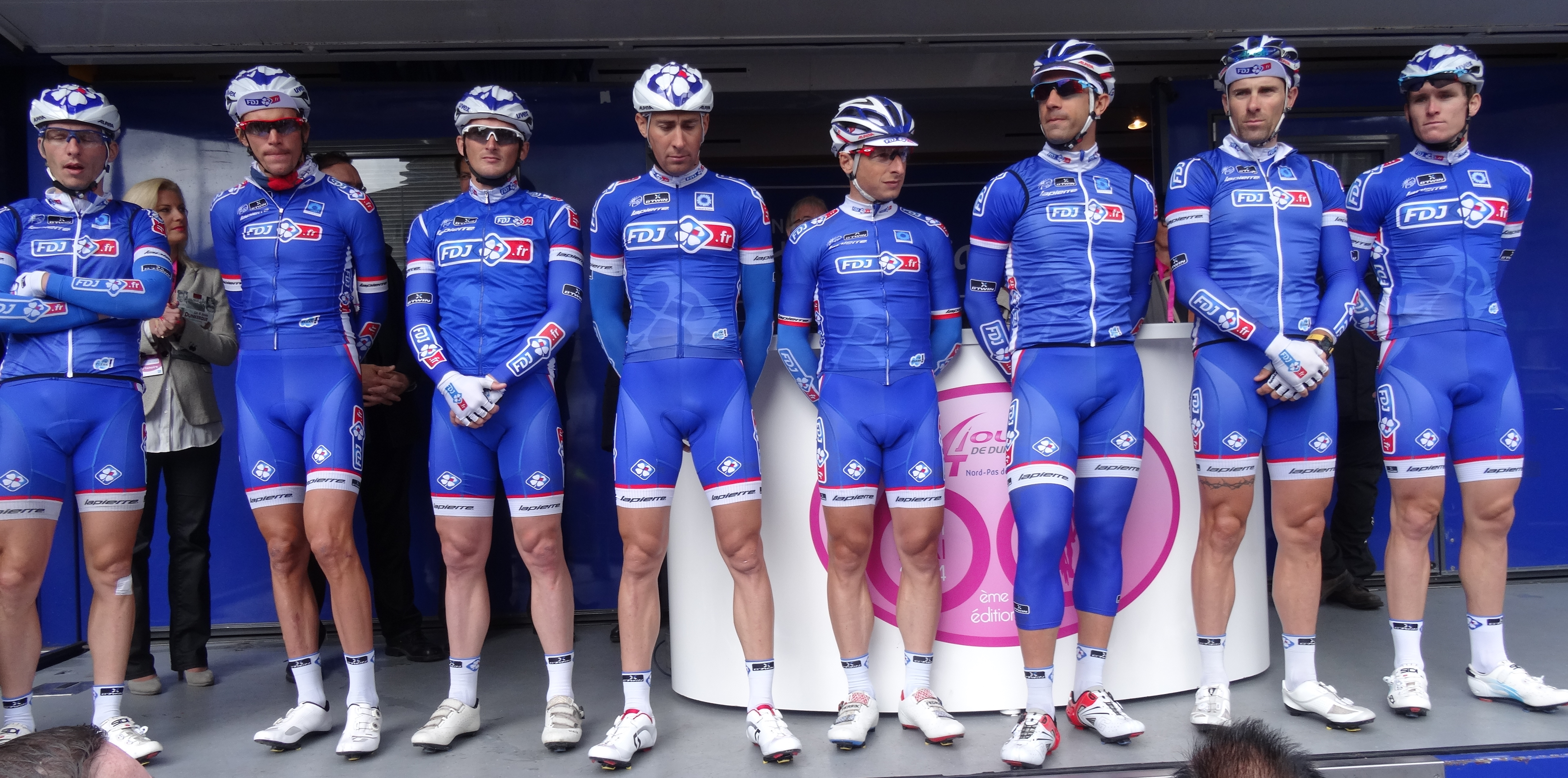 Reportage photographique réalisé le mercredi 7 mai 2014 au départ de la première étape de l'édition 2014 des Quatre jours de Dunkerque à Dunkerque, Nord, Nord-Pas-de-Calais, France. Depicted people: William Bonnet, Yoann Offredo, Mickaël Delage, Matthieu Ladagnous, Pierrick Fédrigo, Anthony Geslin, David Boucher and Arnaud Démare Depicted team: FDJ.fr